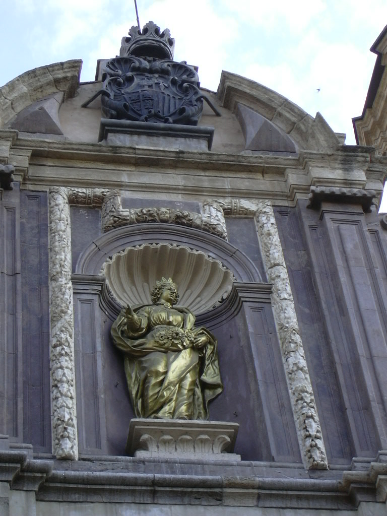 Zaragoza - Iglesia de Santa Isabel de Portugal - Barroco de los siglos XVII y XVIII - Detalle de fachada principal